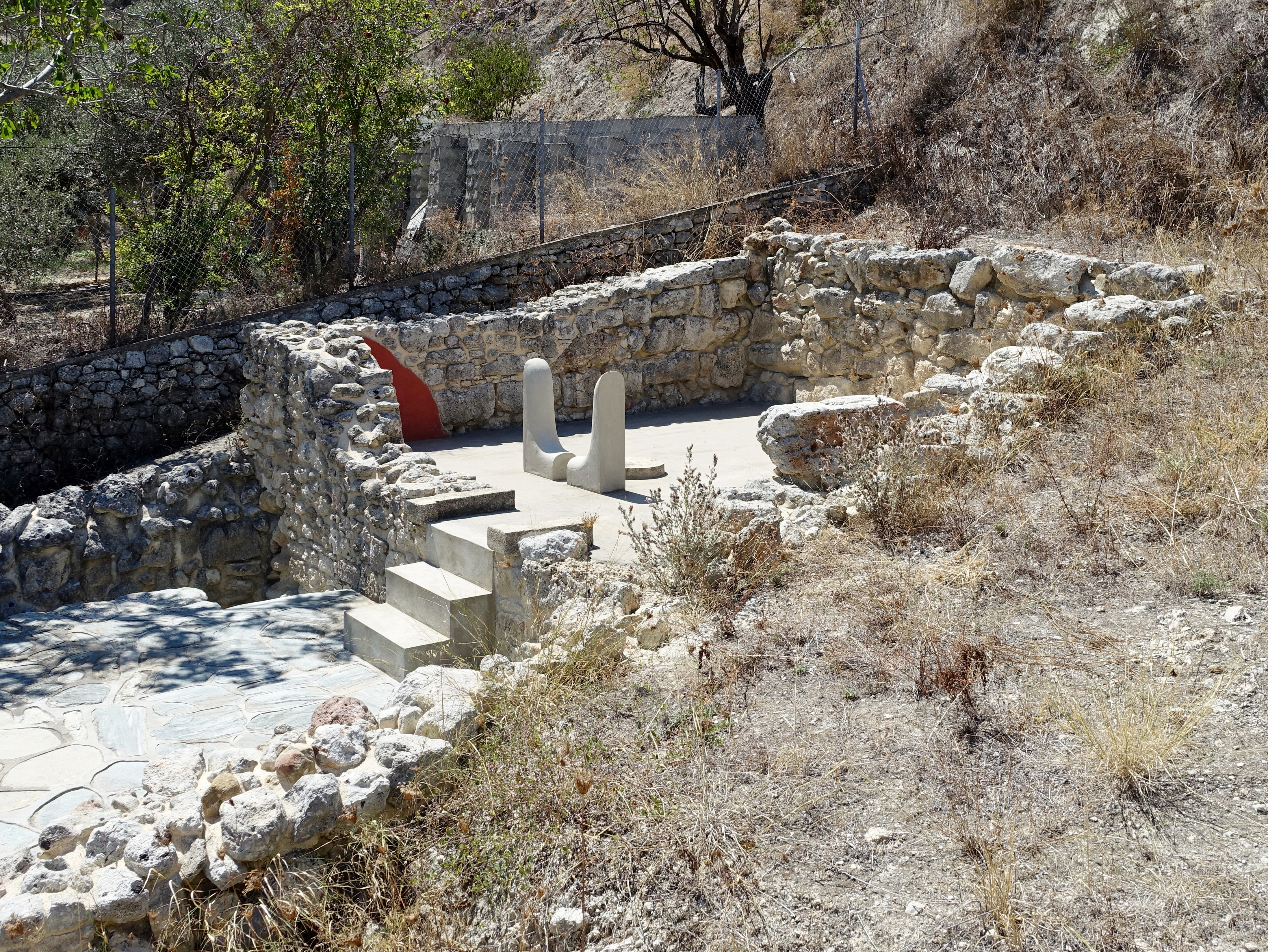 Ausgrabungsstätte des königlichen Tempelgrabes (Βασιλικός Τάφος και Ιερό) bei Knossos (Κνωσσός), Gemeinde Iraklio, Regionalbezirk Iraklio, Kreta, Griechenland